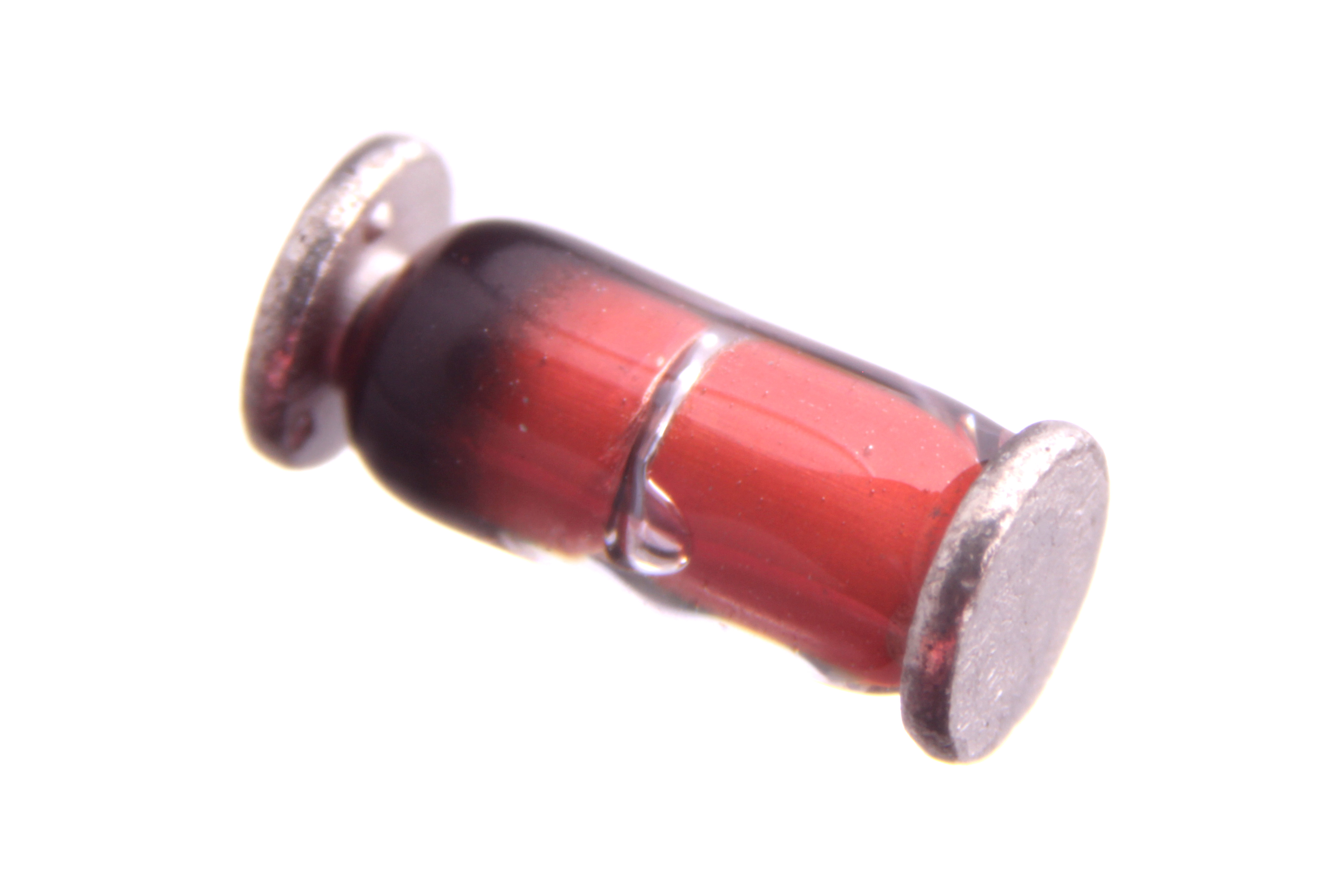 mini-MELF 300 mA diode.